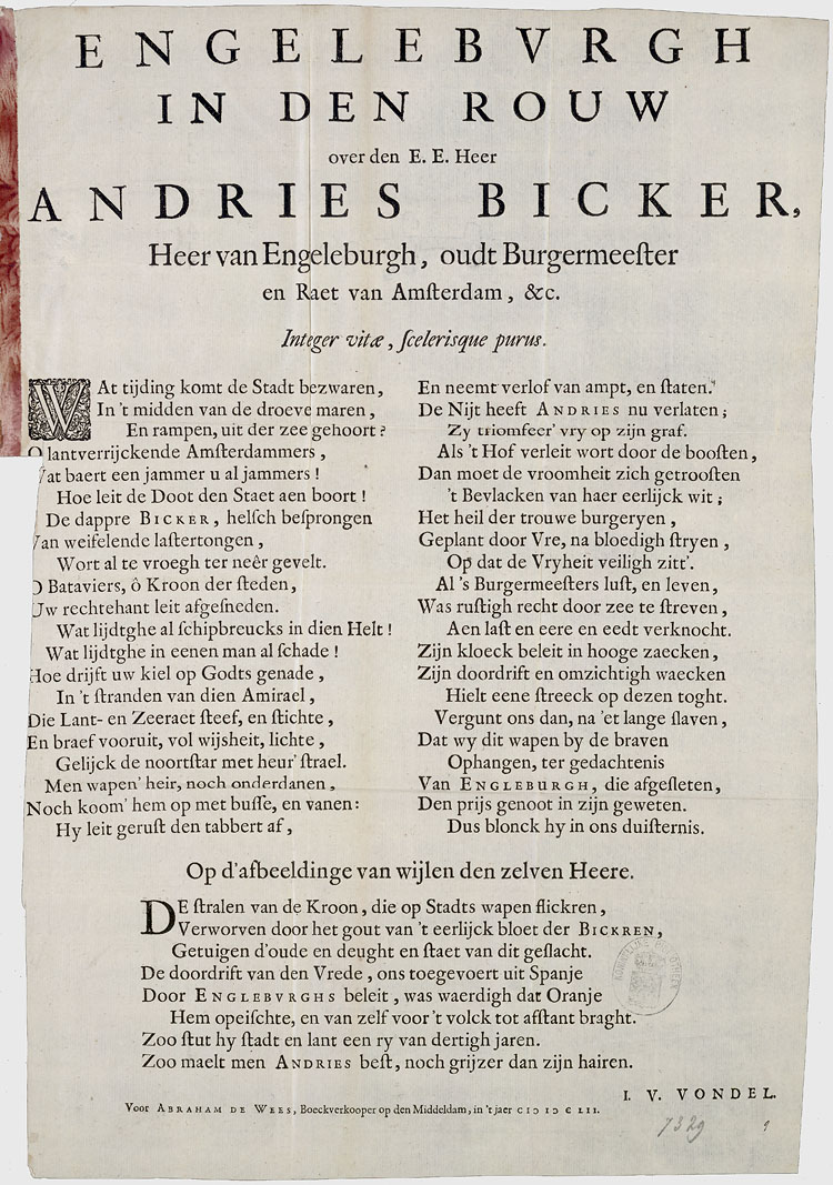 Vondels Gedicht auf Andries Bicker